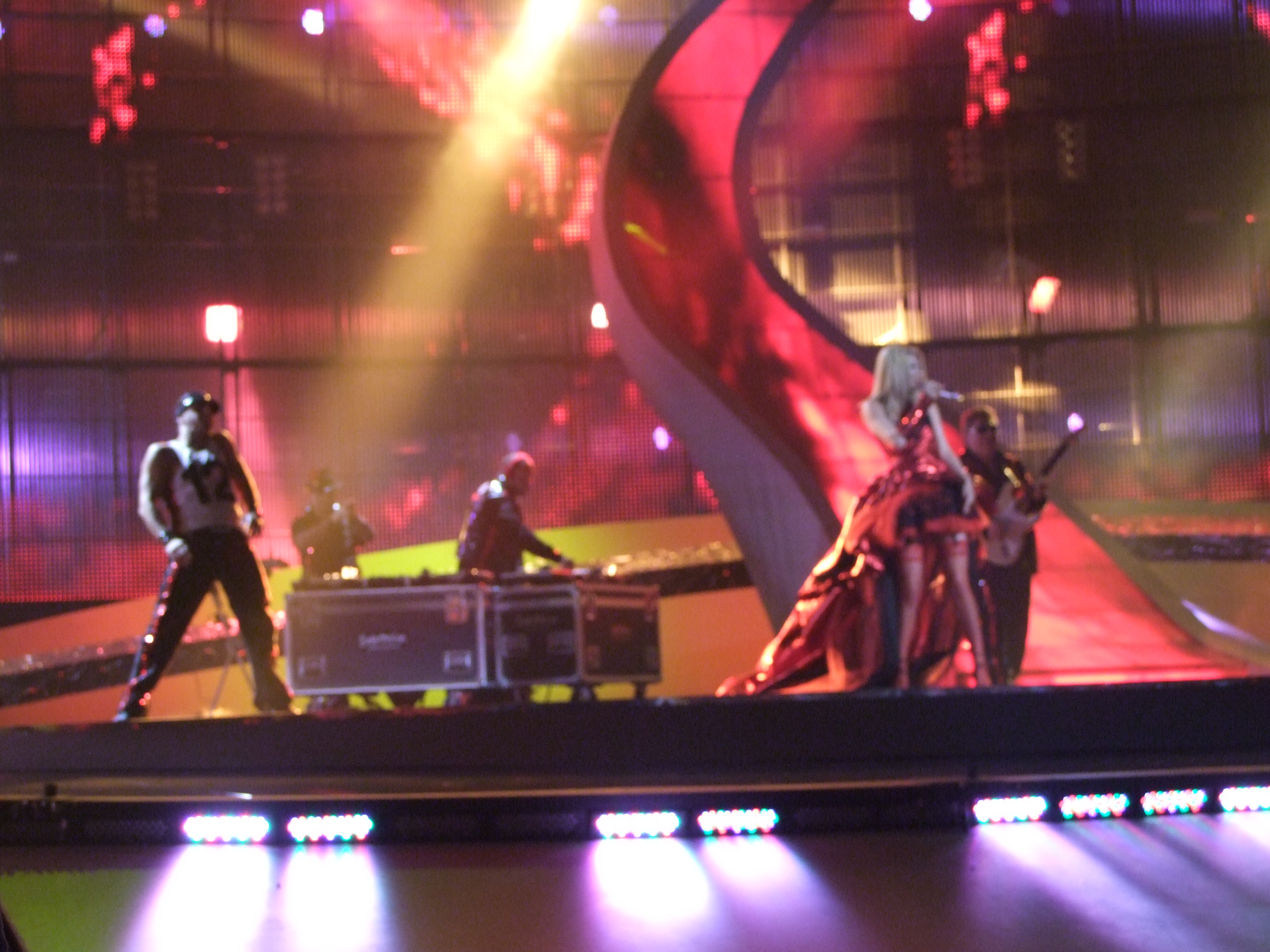 Semifinal 2 Eurovision 2008